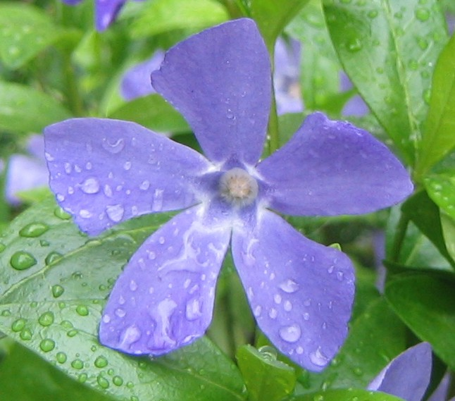 Bloem van Vinca minor (Kleine maagdenpalm). Eigen foto